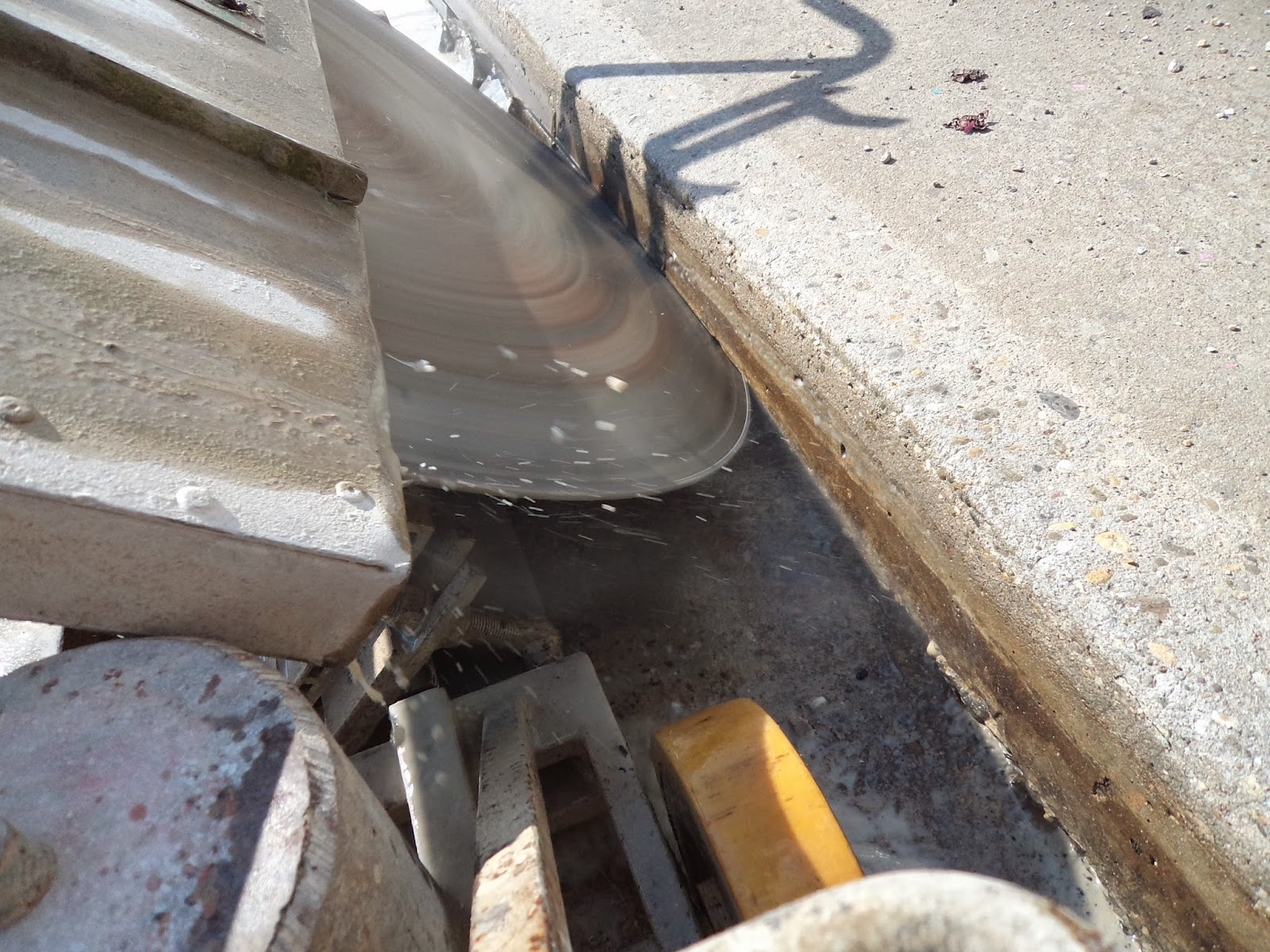 Schrammbord, Schrammbord-Schnitt, Betonschnitt, Betonschneiden.